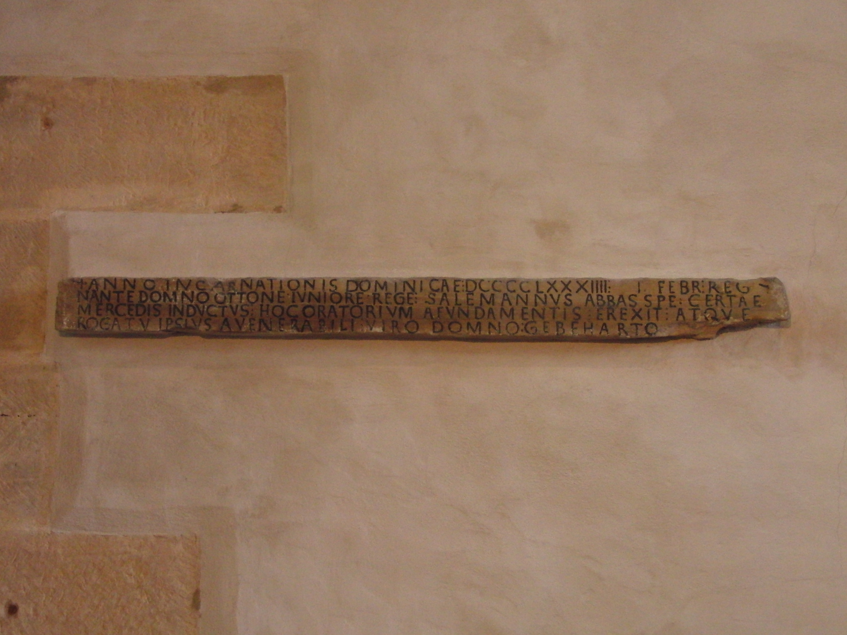 Johanneskirche Weiheinschrift Nordportal